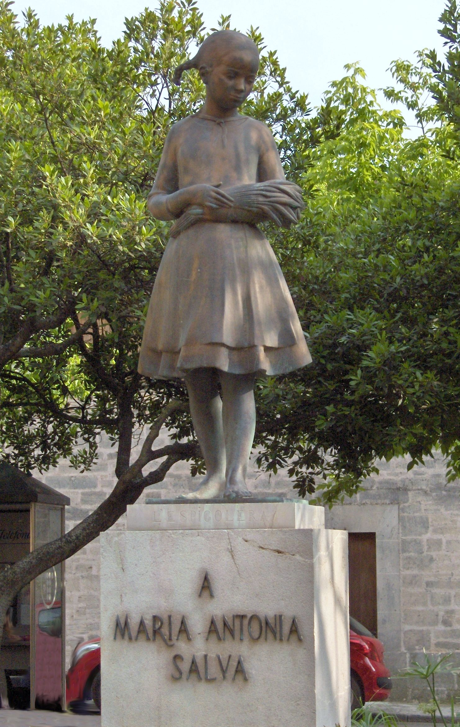 S'Espigolera. Monument a la poetessa Maria Antònia Salvà i Ripoll, situat a Llucmajor, Mallorca